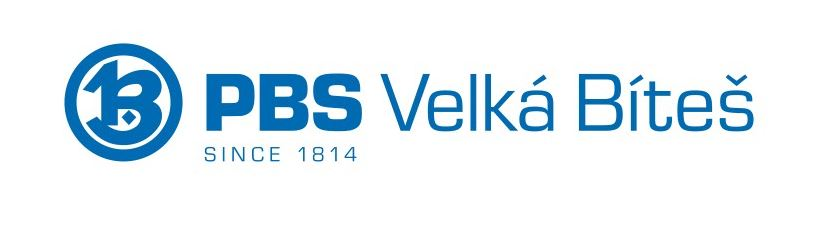 Logo PBS Velká Bíteš